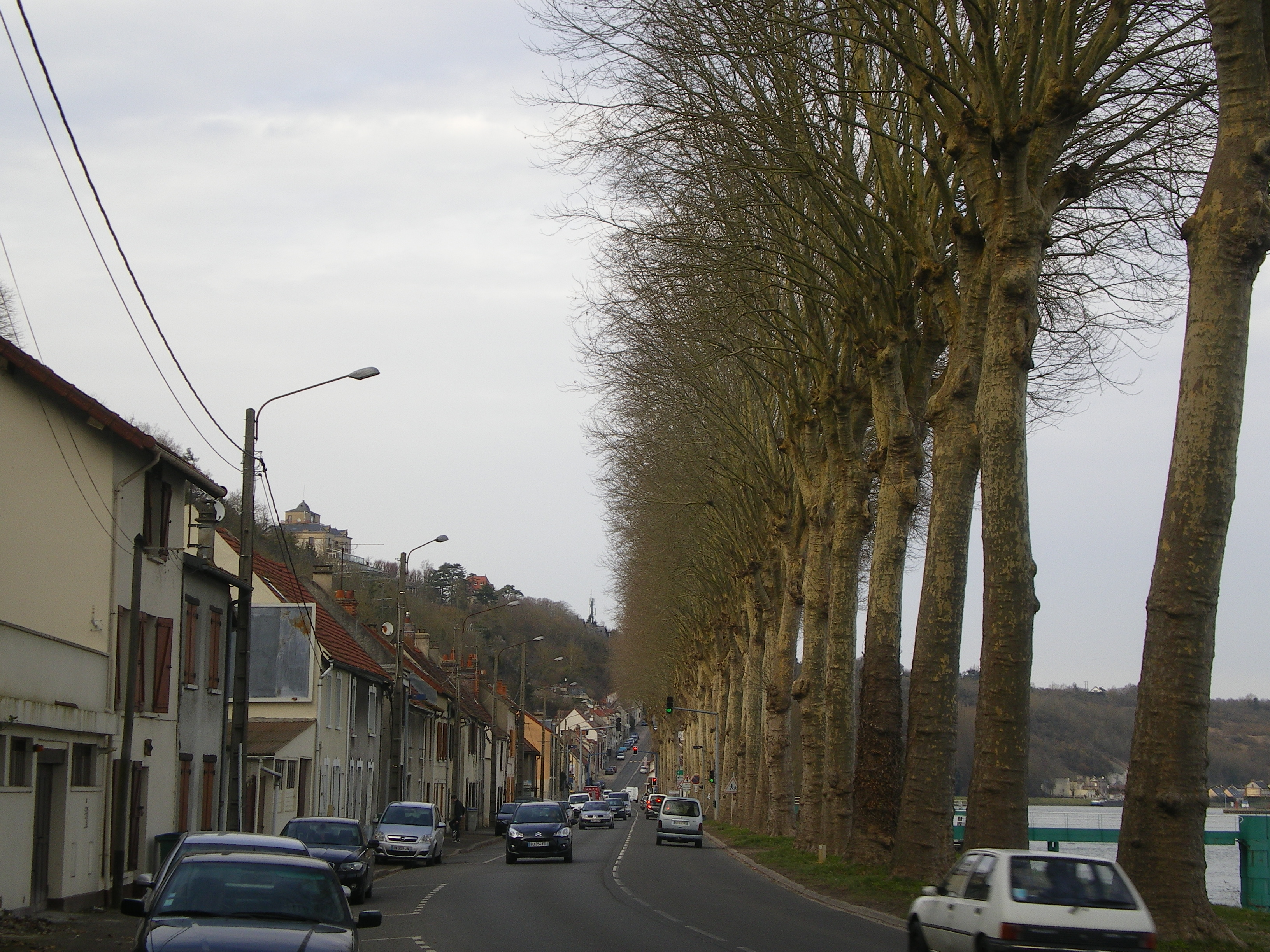 Nationale 13 à Rolleboise